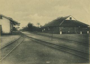 Bahnhof von Bohicon, Benin